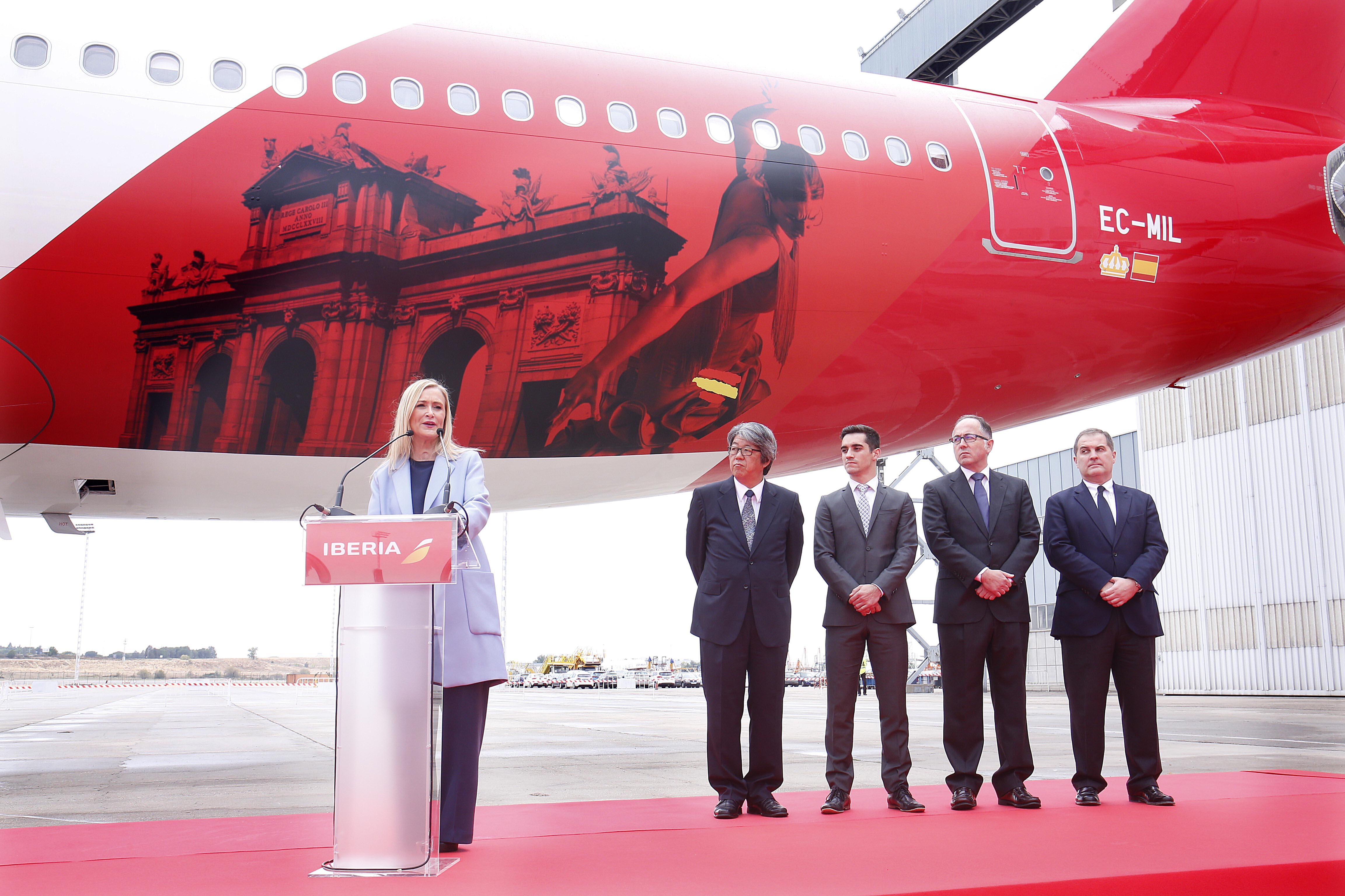 Madrid y Tokio vuelven a estar, desde mañana, unidas en vuelo directo. Hoy ha tenido lugar la presentación de esta nueva línea, y hemos visitado el avión que mañana realizará el primer vuelo, vinilado con el lema 'Madrid, el corazón de España'. Avanzamos en el compromiso de promover mejoras en las conexiones aéreas con la incorporación de esta nueva línea directa con el continente asiático. Y continuamos comprometidos con el turismo de calidad, fuente de riqueza y generación de empleo. A partir de mañana, un nuevo puente se abre entre España y Japón, cuyos turistas han demostrado querer y sentir nuestro país. Bienvenidos a Madrid.